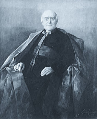 L'historien Louis Duchesne (1843-1922) dessiné au pastel en 1911 par Betty de Rothschild.